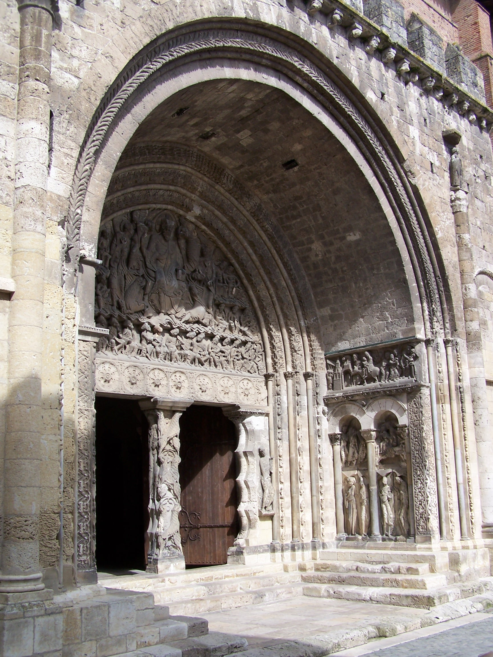 Le portail sud de l'ancienne abbaye Saint-Pierre de Moissac (Tarn-et-Garonne). Tympan et porche romans du début du XIIe siècle.